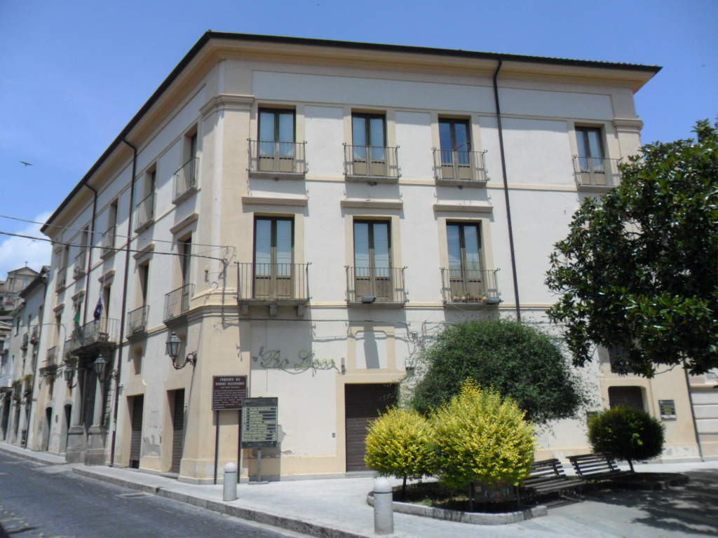 Gioiosa Jonica Palazzo Municipale ex Convento dei Frati Minori Osservanti